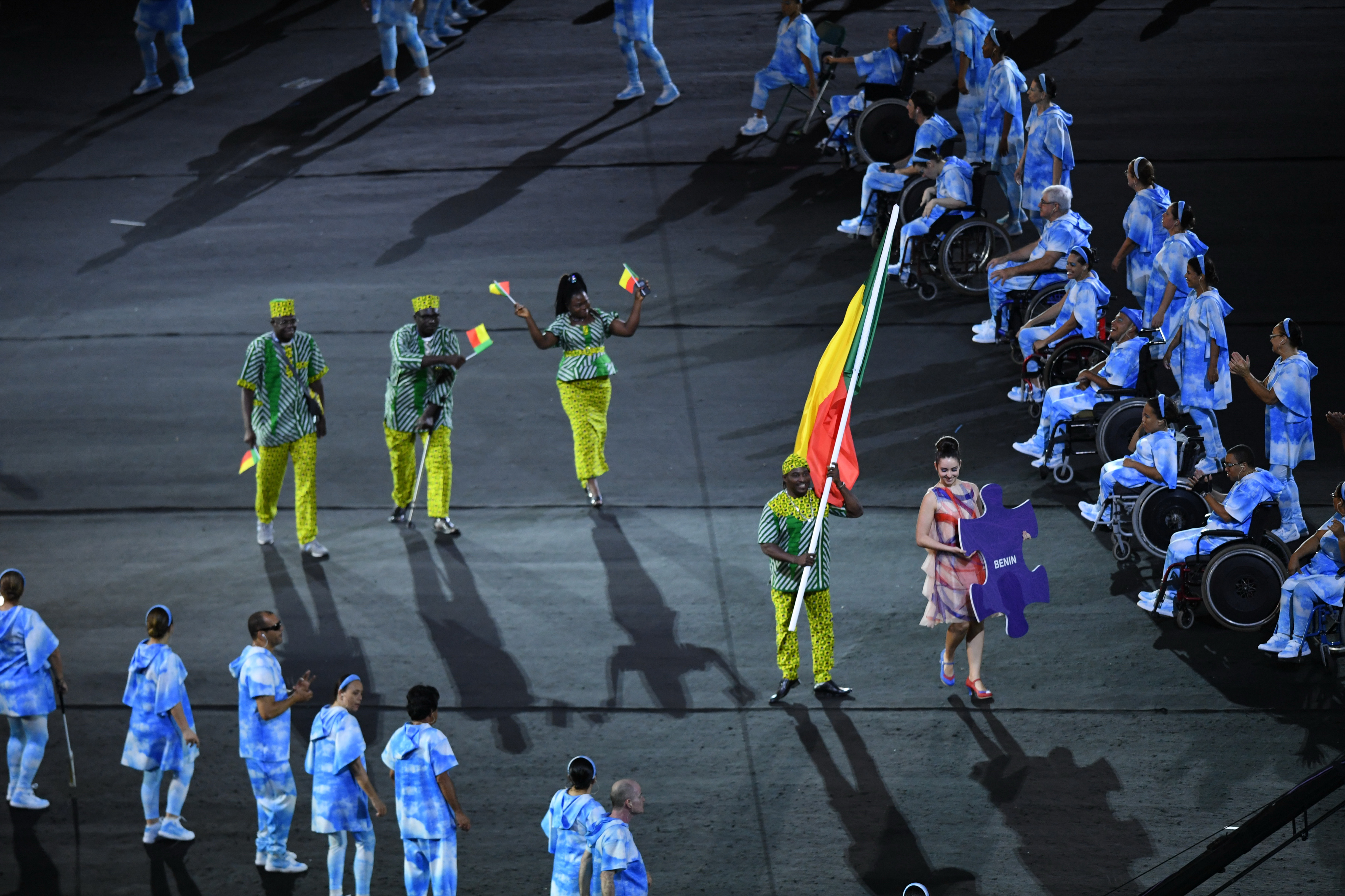 Rio de Janeiro - Cerimônia de abertura dos Jogos Paralímpicos Rio 2016 no Estádio do Maracanã